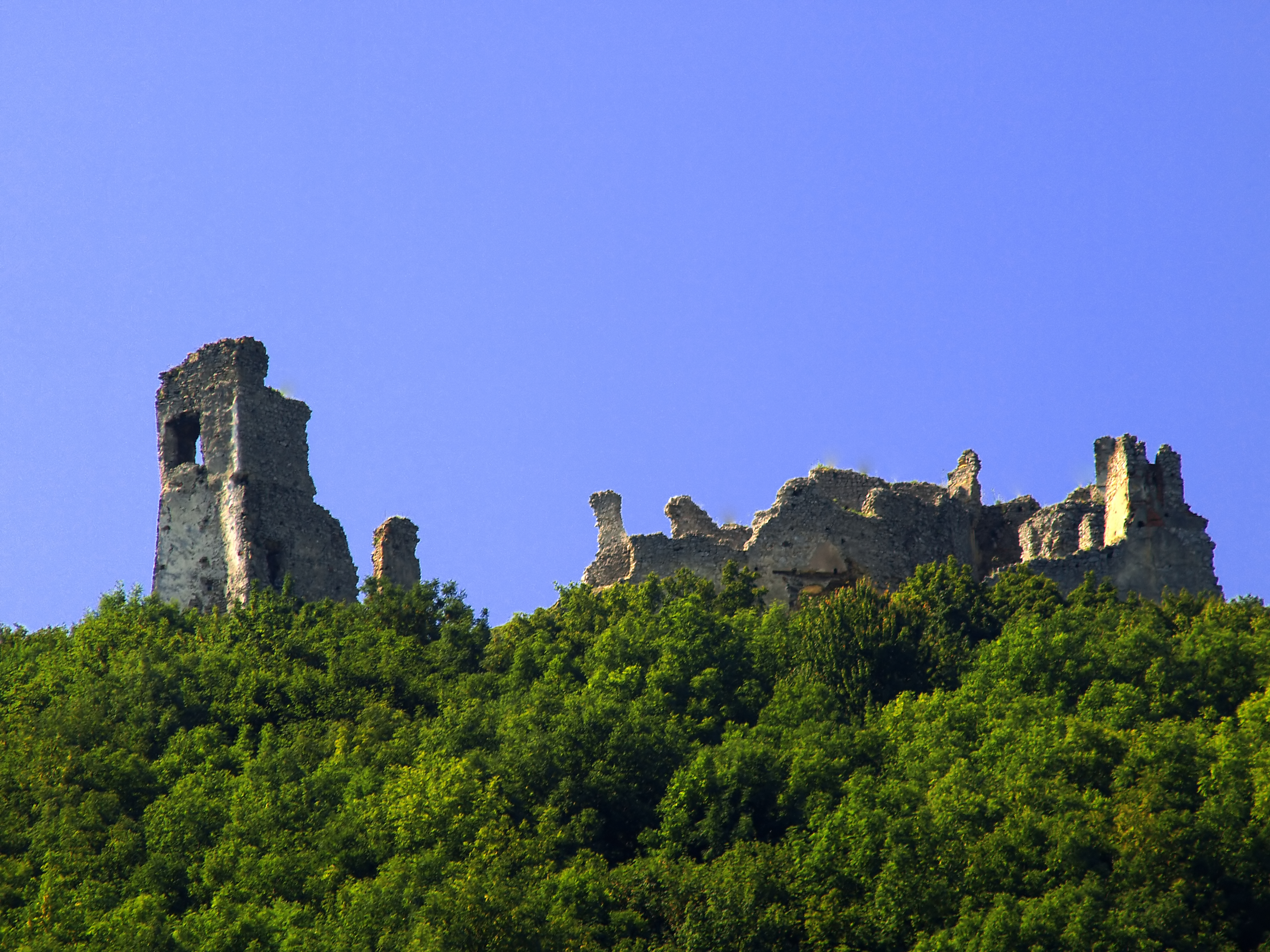 Humenné - Hrad Brekov This medium shows the protected monument with the number 702-113/0 in the Slovak Republic.